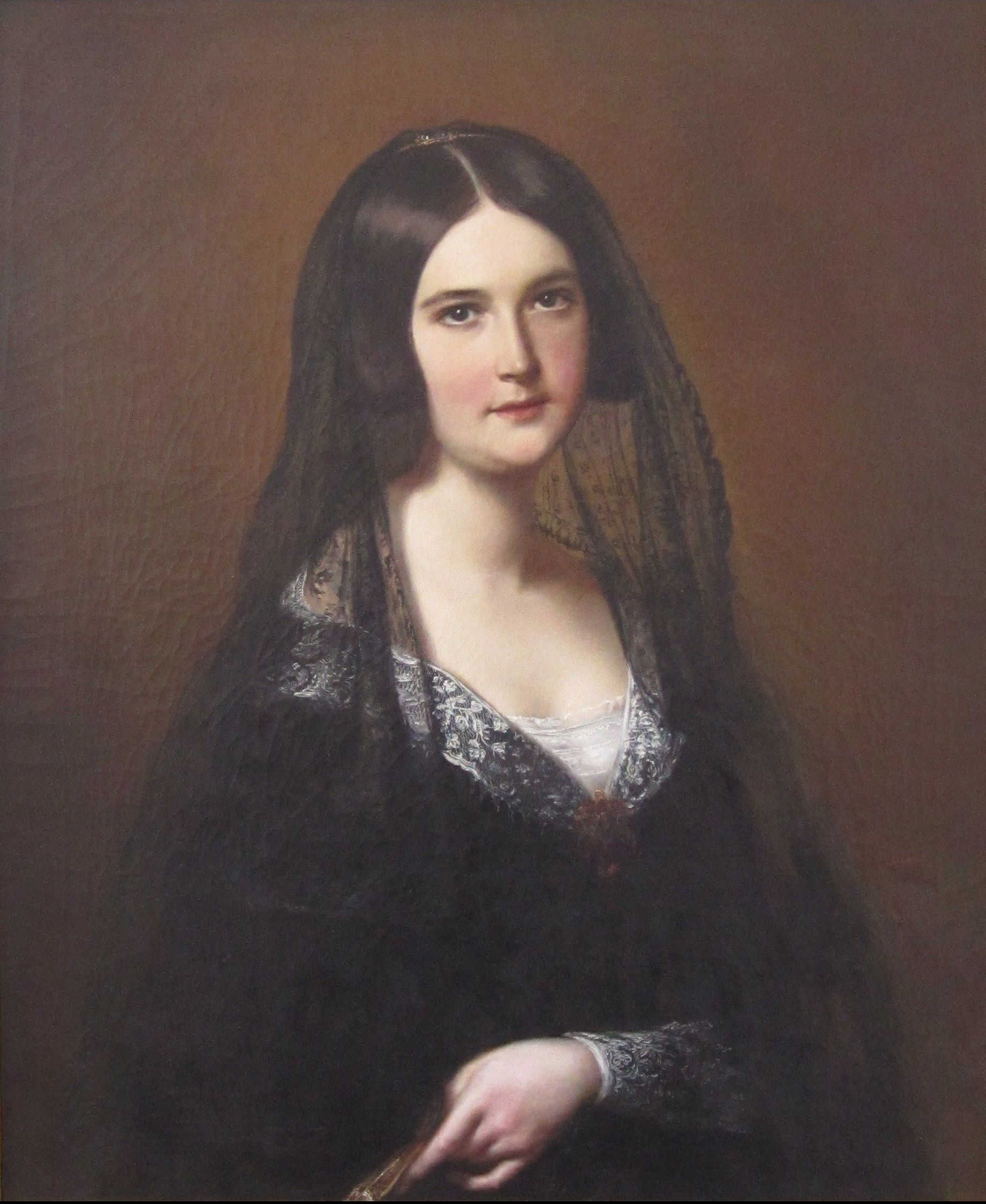 Dama con abanico, óleo del pintor alemán Julius Jacob